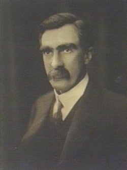 Sir Kerr Grant